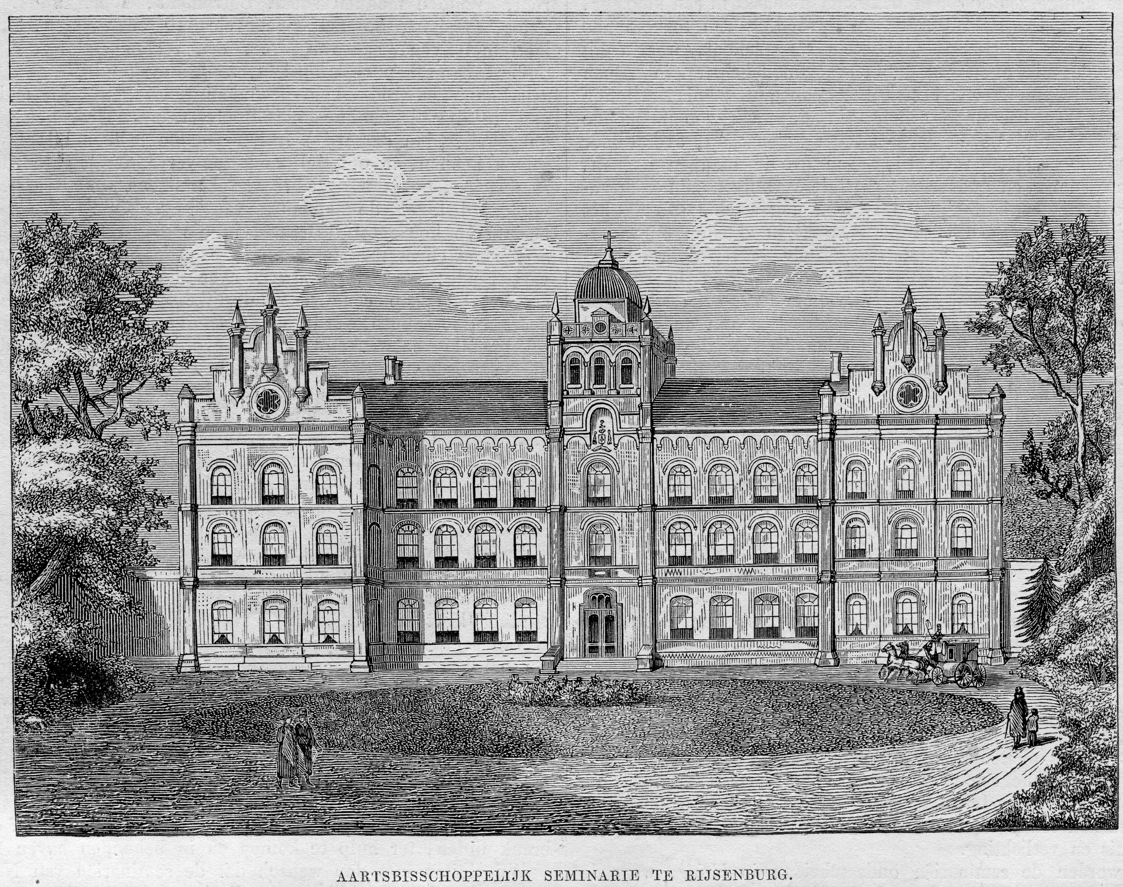 Kath. Illustratie 1869-1870 nr 46 p.368 Aartsbisschoppelijk seminarie te Rijsenburg